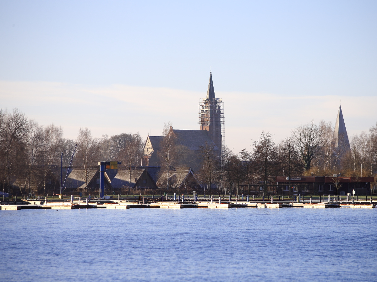 Marienkirche und Nikolaikirche in Röbel/Müritz